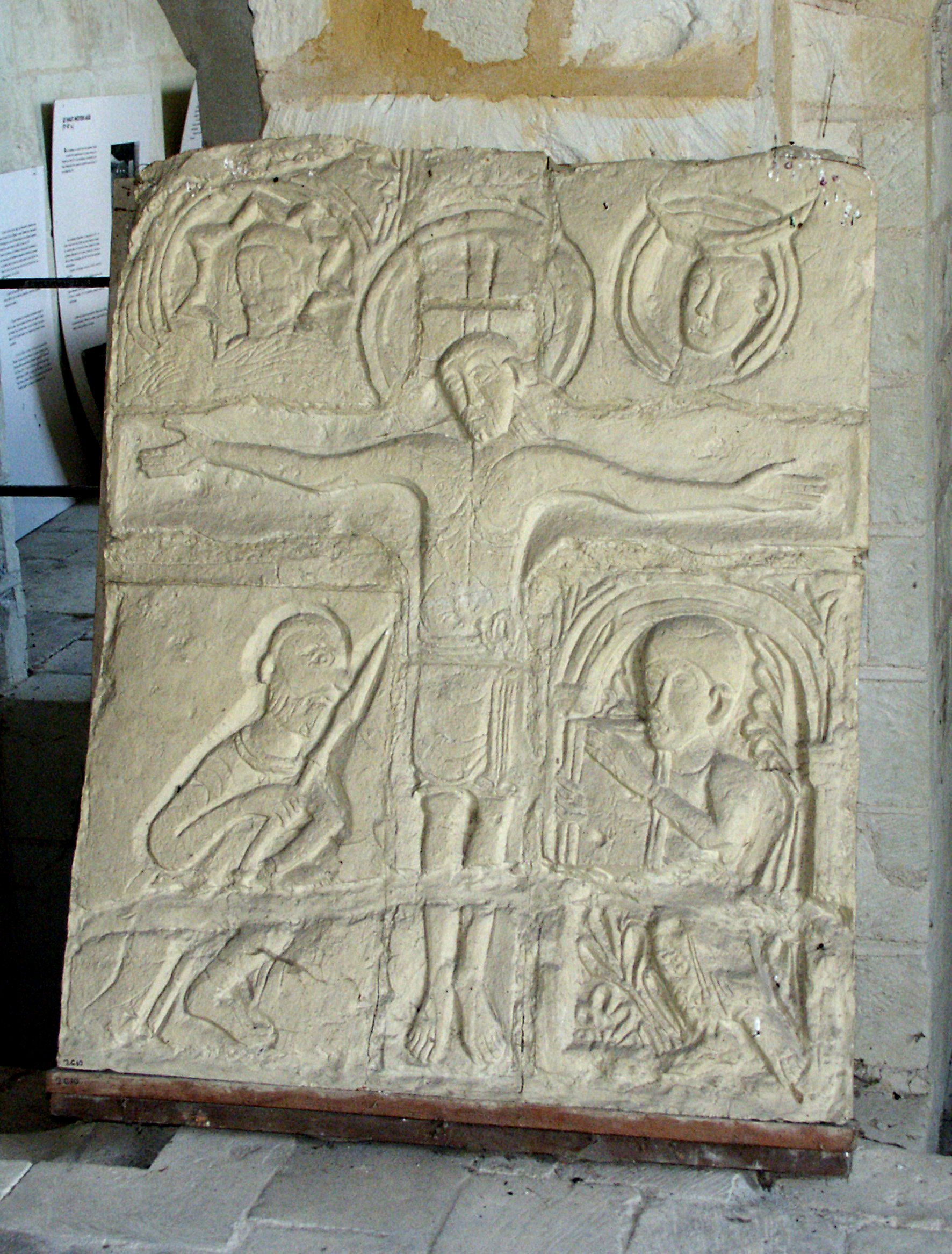 Moulage qui se trouvait en haut de la première façade de l'an Mil, exemple de sculpture du premier art roman en Touraine